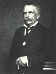 Porträt des Hoteliers Rudolf Sendig.